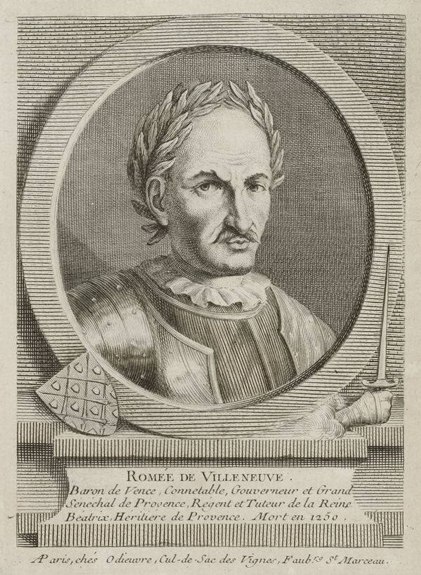 Romée de Villeneuve, baron de Vence